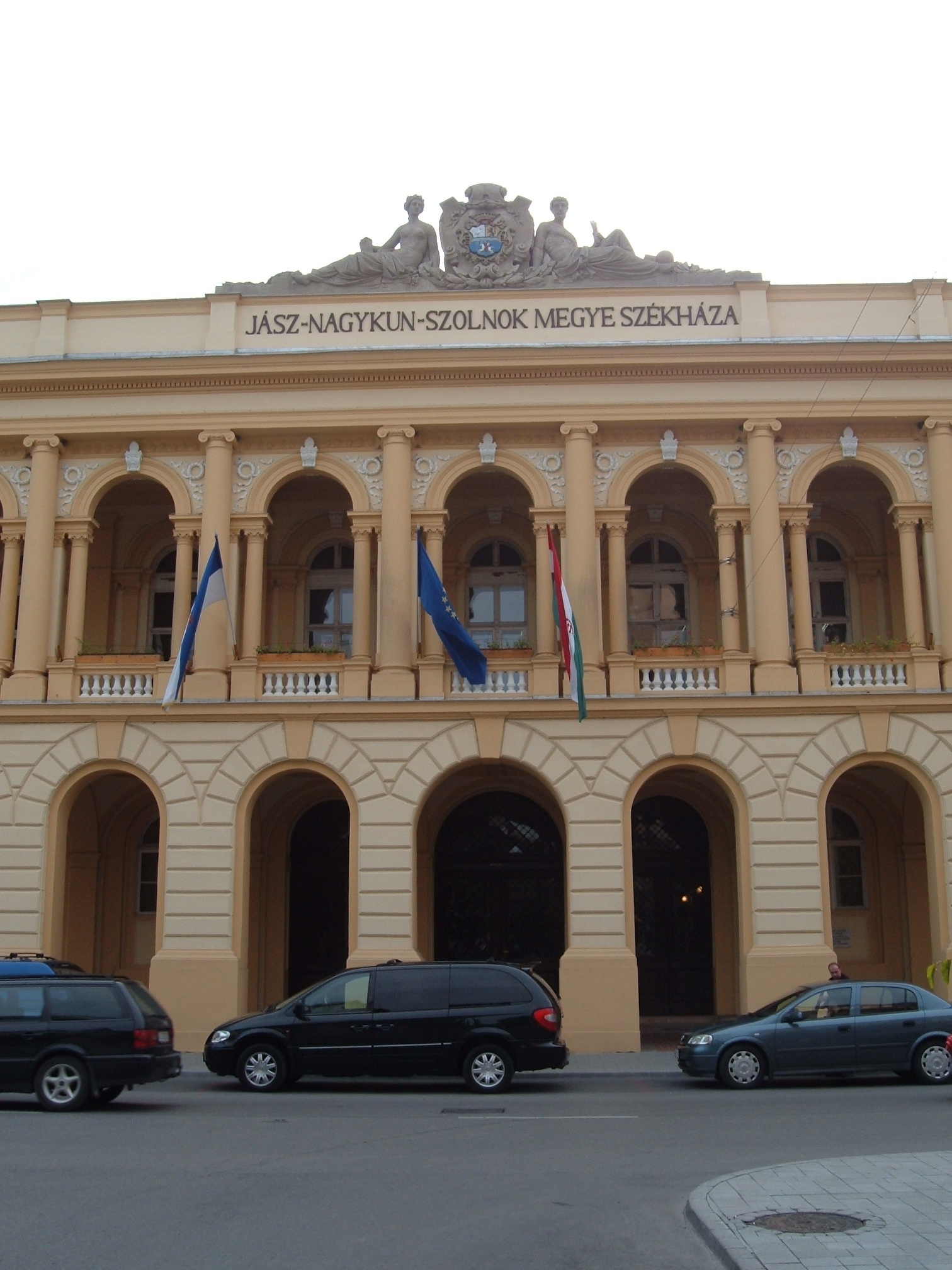 Megyeháza (Szolnok)